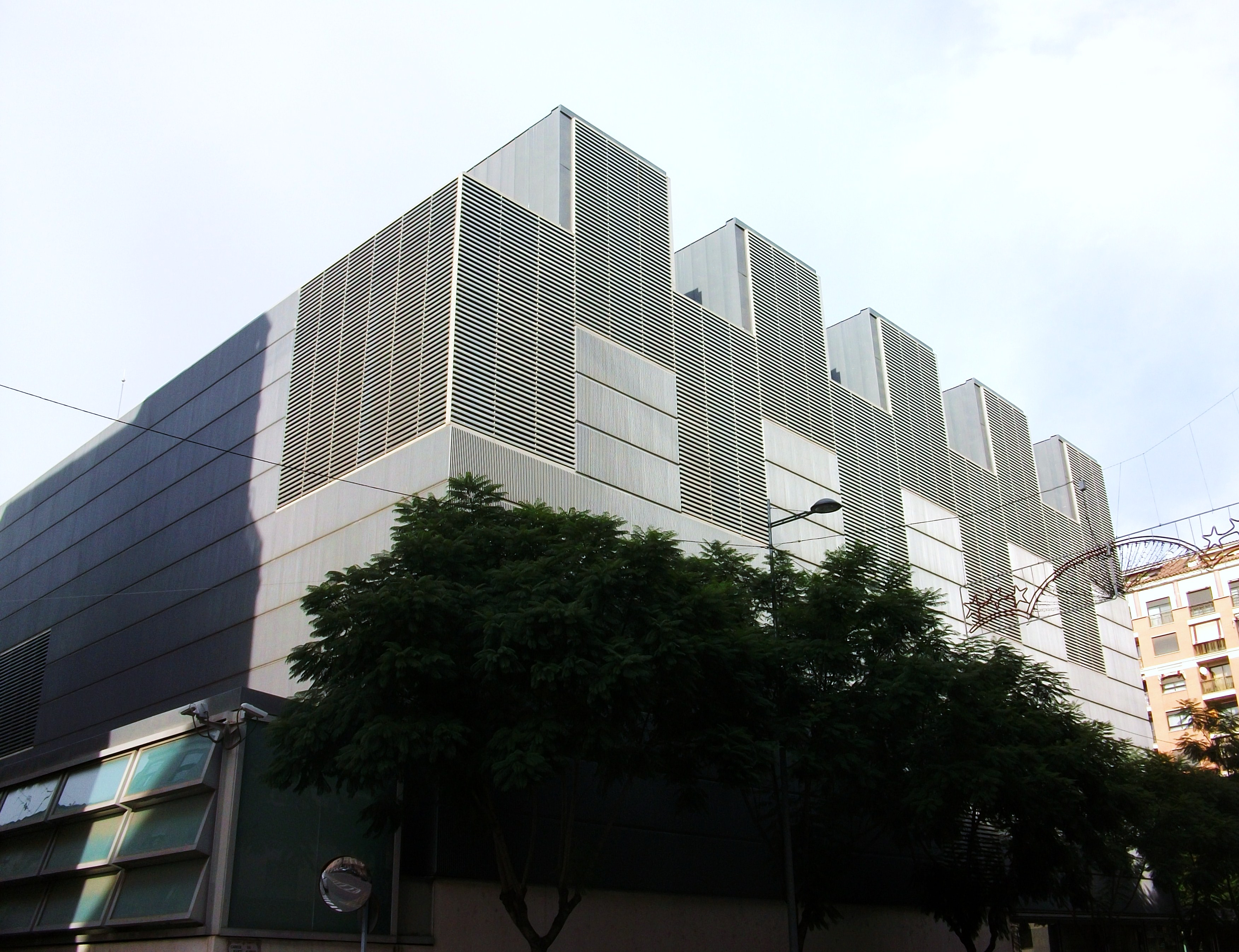 Exterior del Museu de Belles Arts, Castelló de la Plana.